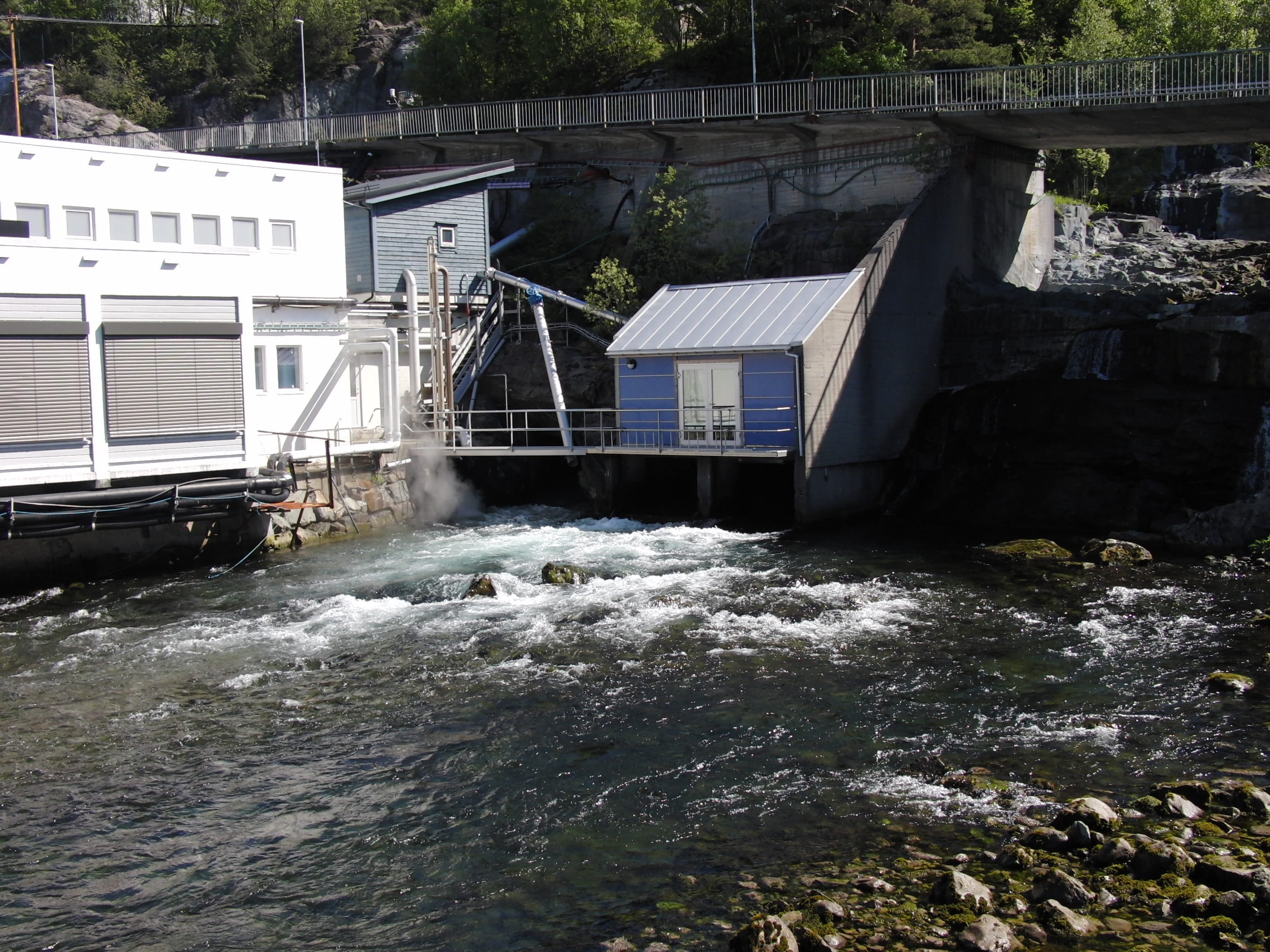 Utløpet fra Svelgen II og Svelgen IV kraftverk